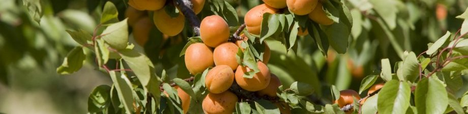 Patrimoine local l'abricot